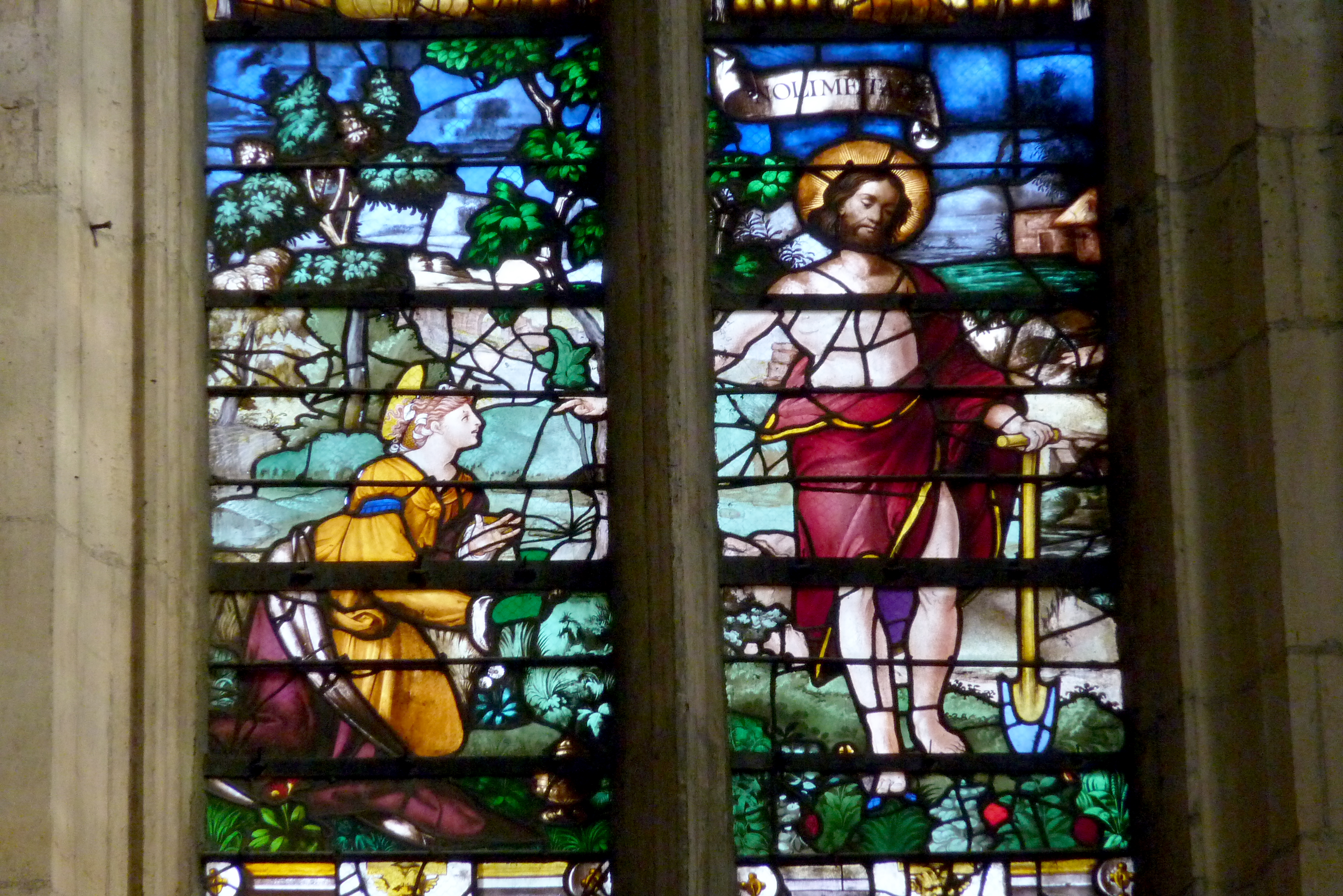 Katholische Pfarrkirche Saint-Aspais in Melun im Département Seine-et-Marne in der Region Île-de-France (Frankreich), Bleiglasfenster im Chor aus dem 16. Jahrhundert, Darstellung: Noli me tangere, der auferstandene Christus und Maria Magdalena (Ausschnitt mittlere Lanzette, mittlere Scheibe)